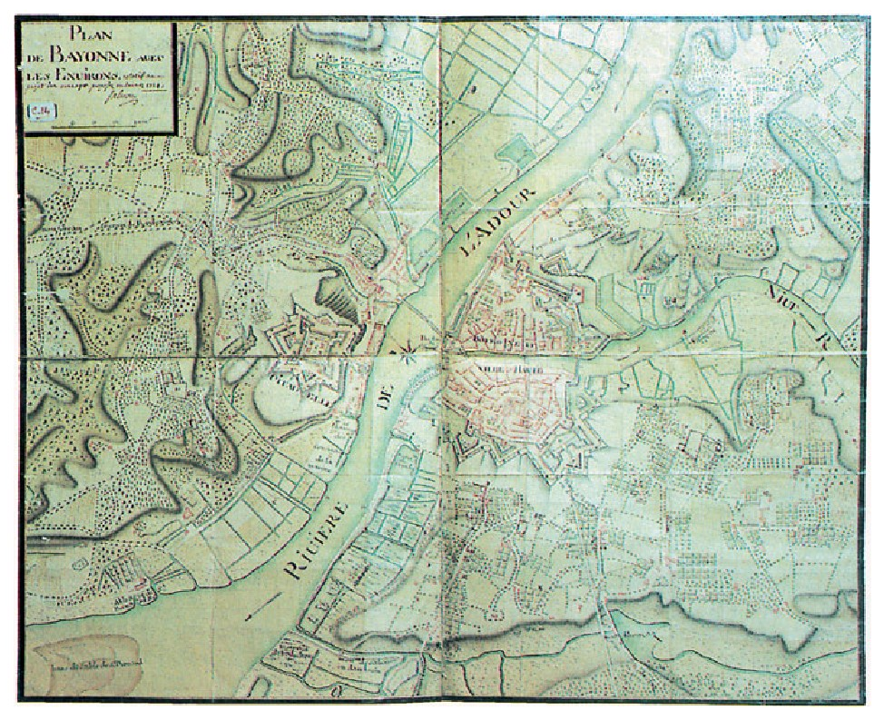 Baionako gotorlekuen planoa. XVIII. mendea. (Baionako Bibliothèque Municipale).